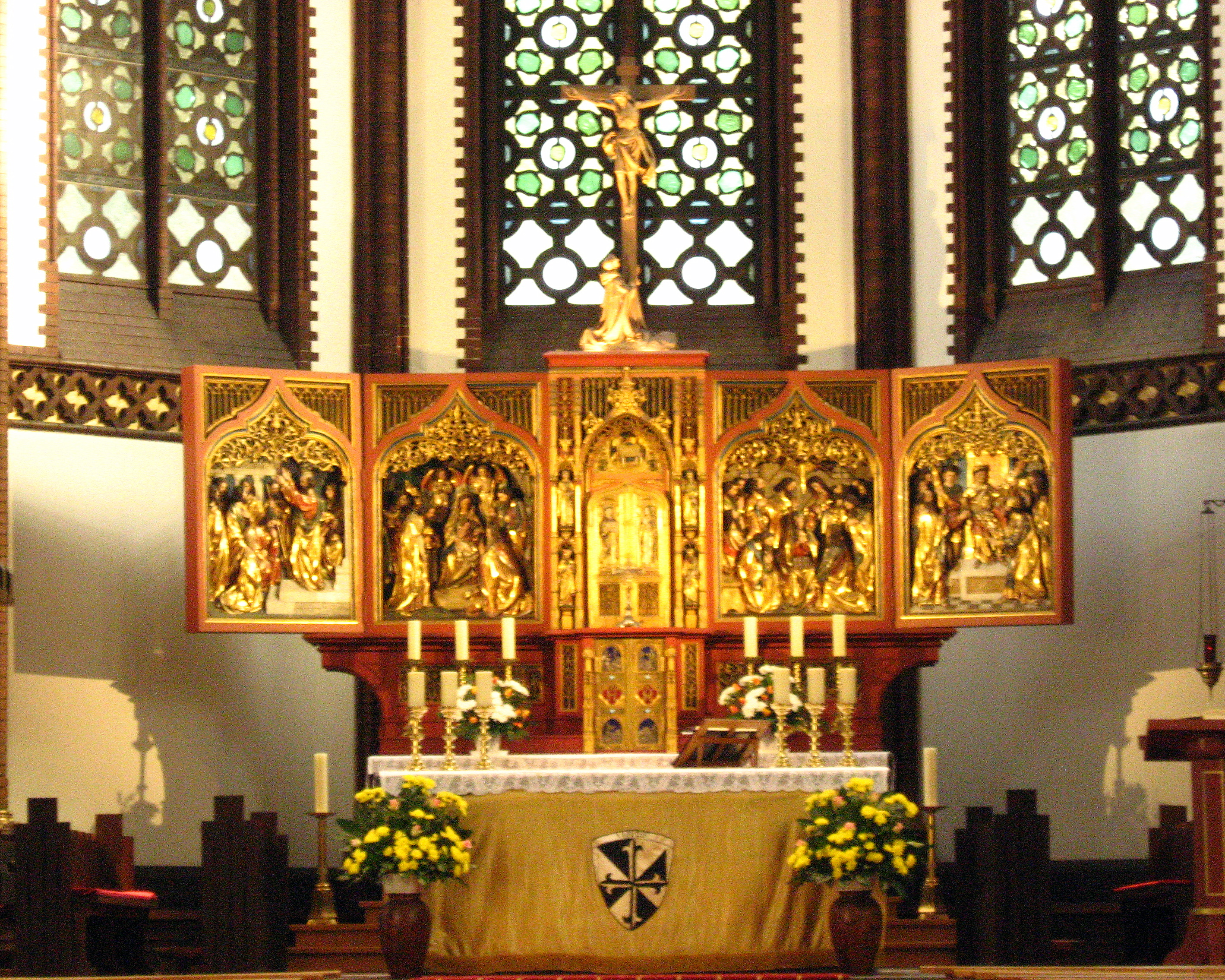 Berlin-Moabit - St. Paulus - Altar